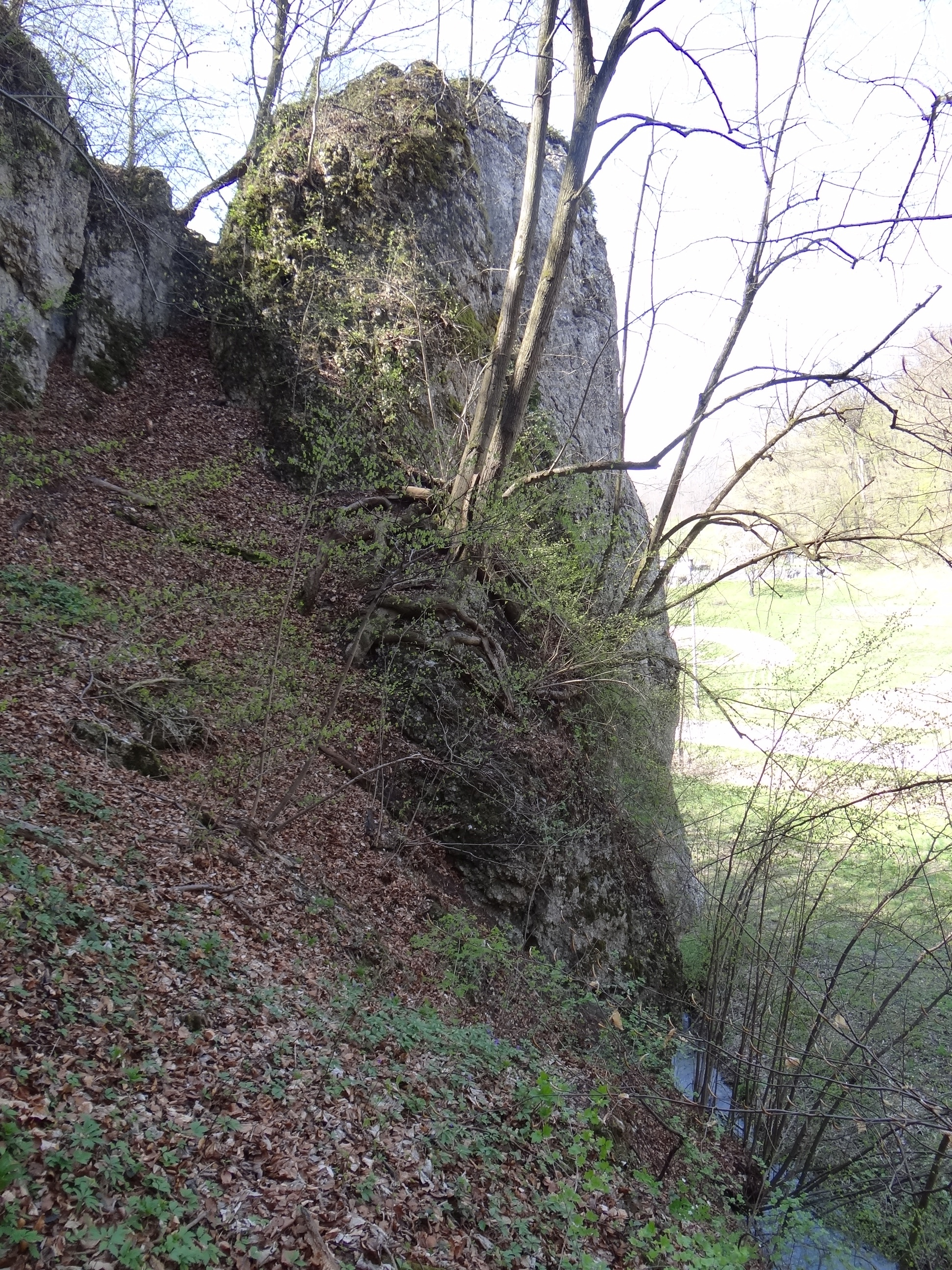 Wodna Skała w Dolinie Szklarki